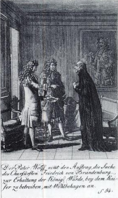 Der Pater Wolff nimmt den Auftrag, die Sache des Churfürsten Friedrich von Brandenburg zur Erhaltung der Königs-Würde bey dem Kaiser zu betreiben, mit Wohlbehagen an. Kupferstich aus: Historisch-Genealogischer Kalender auf das Jahr 1793, Berlin 1793, Nr. 4